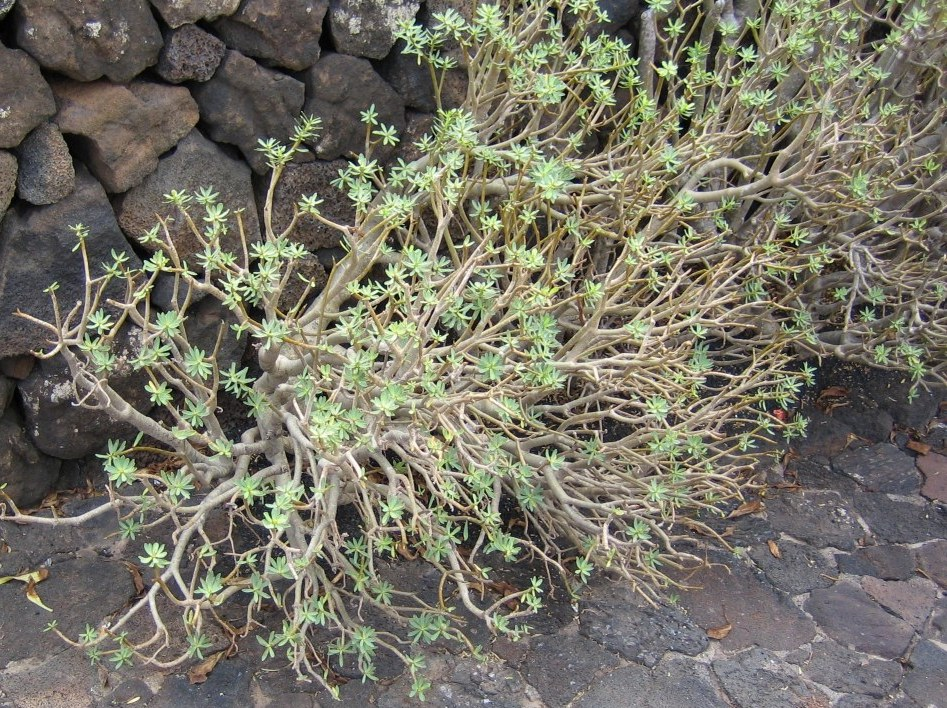 Euphorbia balsamifera. Tabaiba dulce en la Isla de Lanzarote, Islas Canarias.